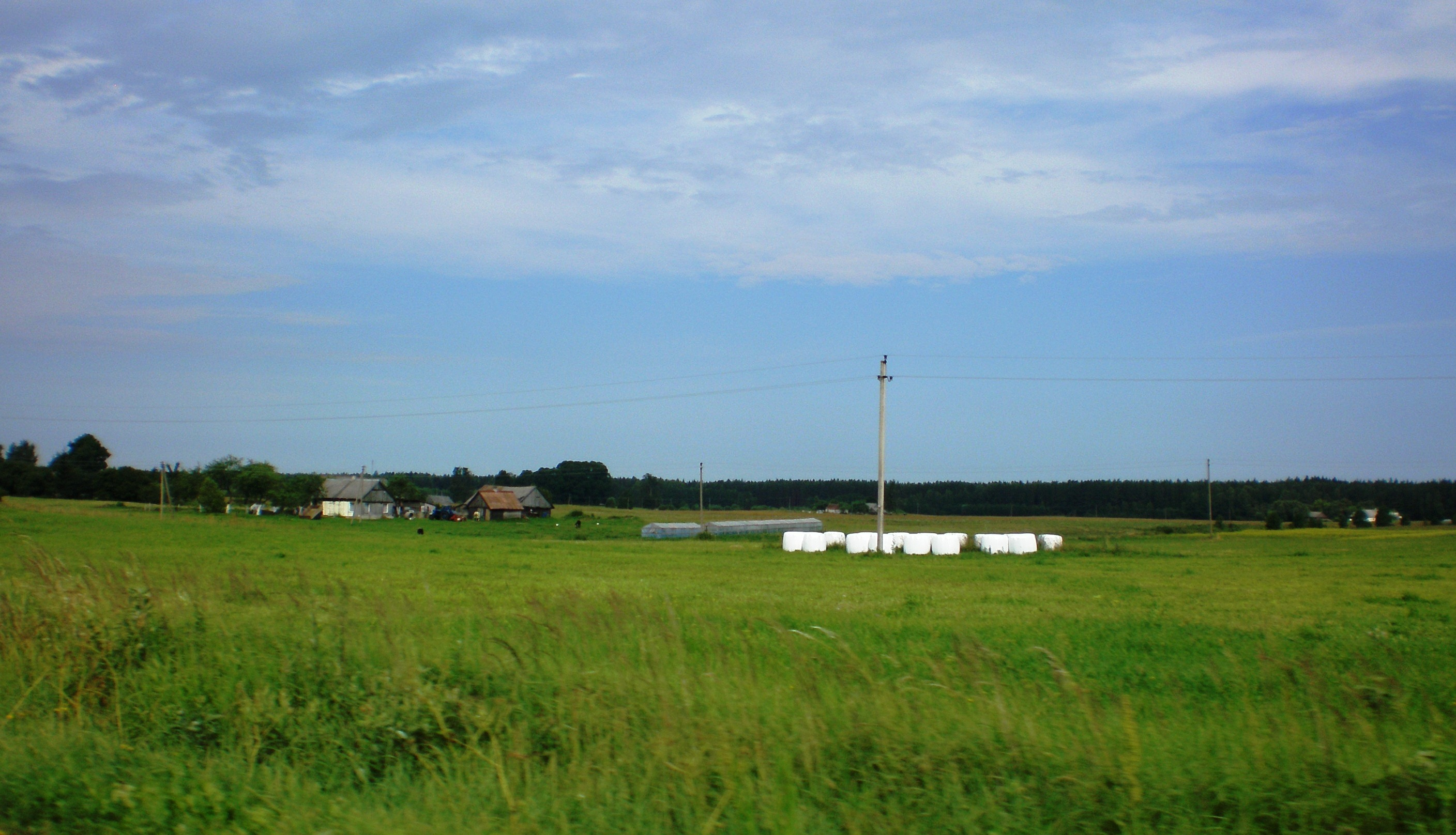 Užbaliai, Kazlų Rūdos savivaldybė